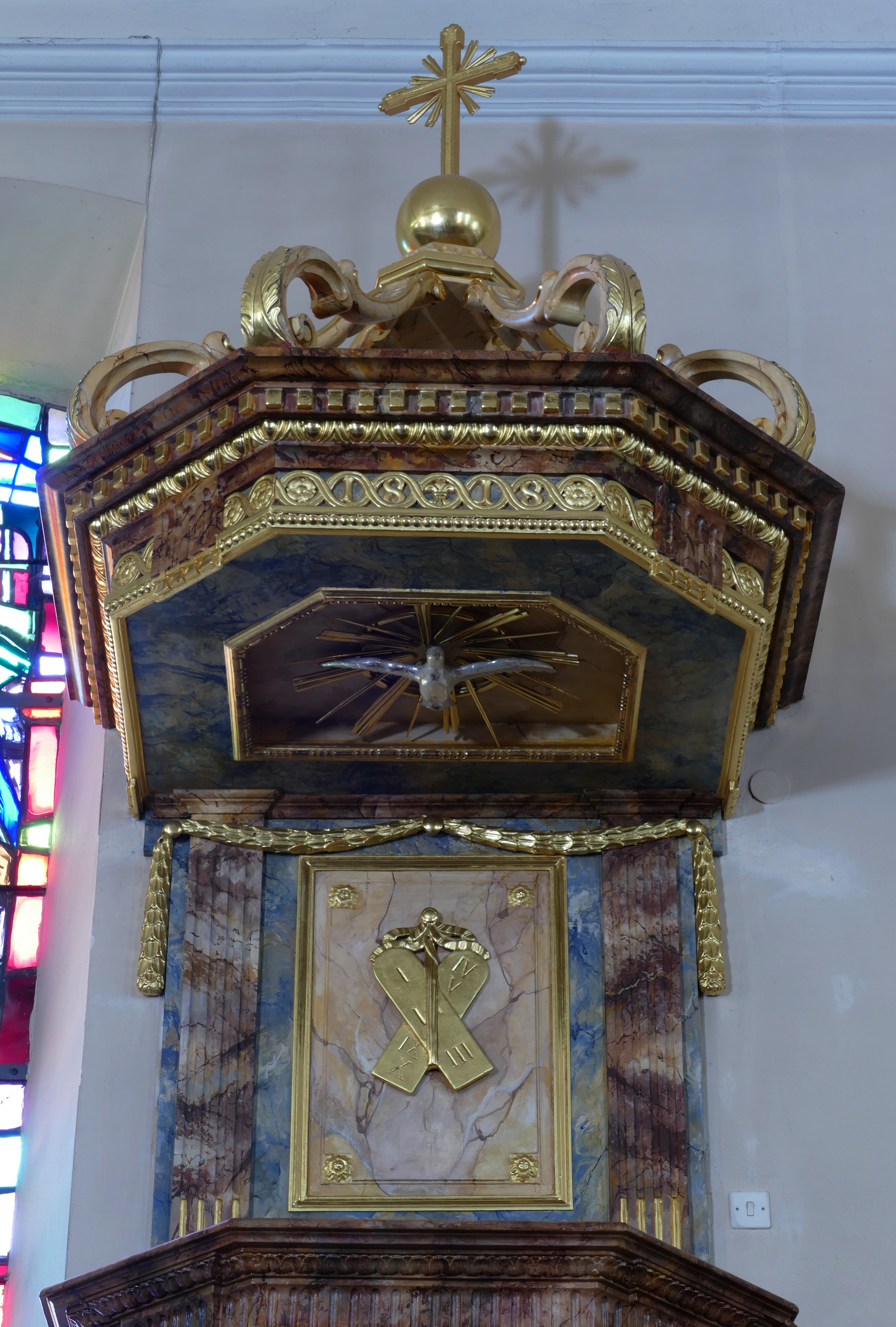 Alsace, Bas-Rhin, Église Saint-Martin de Dachstein (IA67011129). Chaire à prêcher (1er quart XIXe): Abat-voix avec colombe du Saint-Esprit. This object is classé Monument Historique in the base Palissy, database of the French furniture patrimony of the French ministry of culture, under the references PM67000539 and IM67017017.